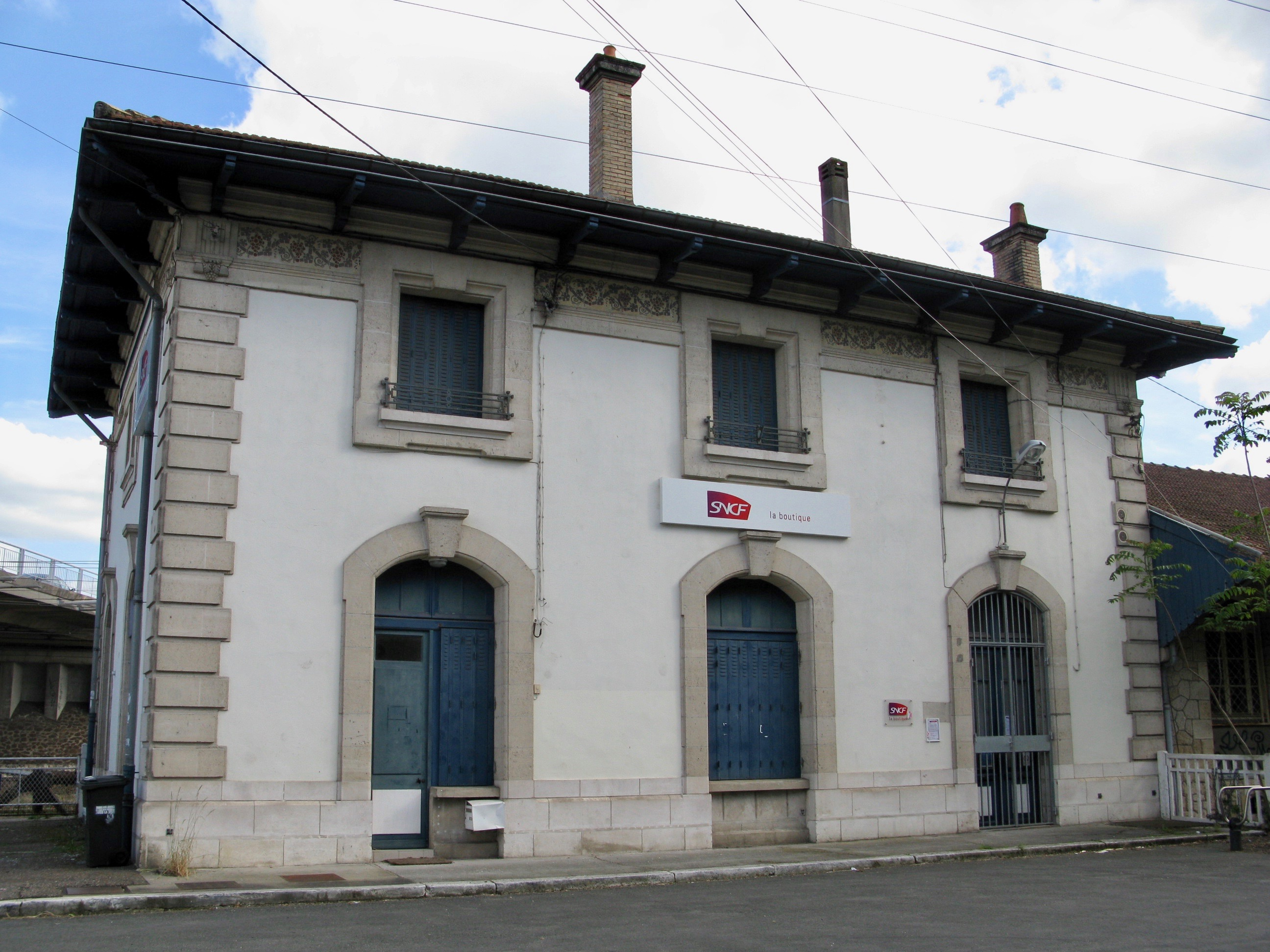 Façade de la Gare de Talence-Médoquine